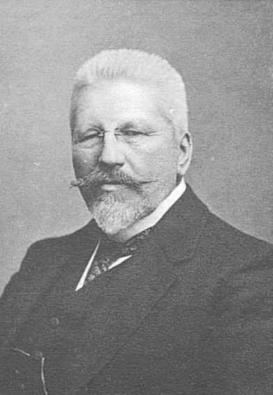 Генрих Ипполитович Свенцицкий, инженер путей сообщения, член Государственной думы от Виленской губернии.